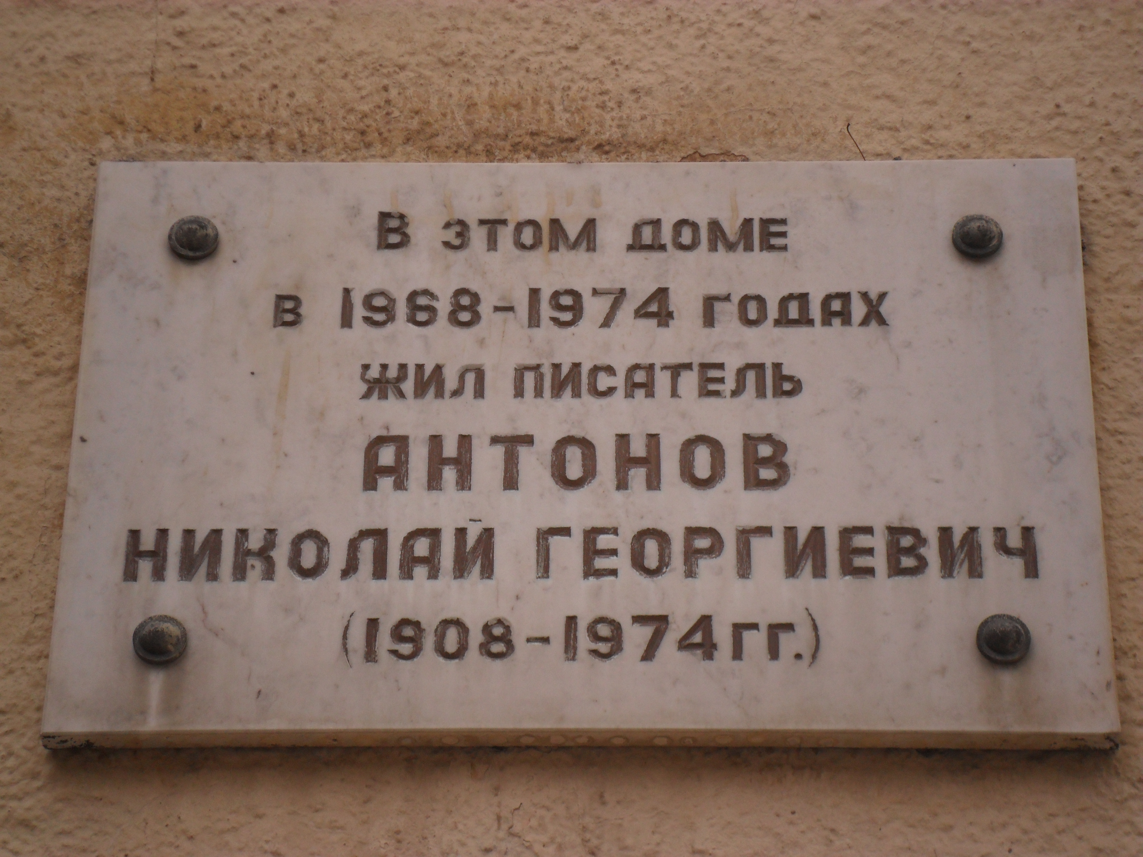 Мемориальная доска писателю Николаю Антонову на улице Коммунистической в Смоленске.